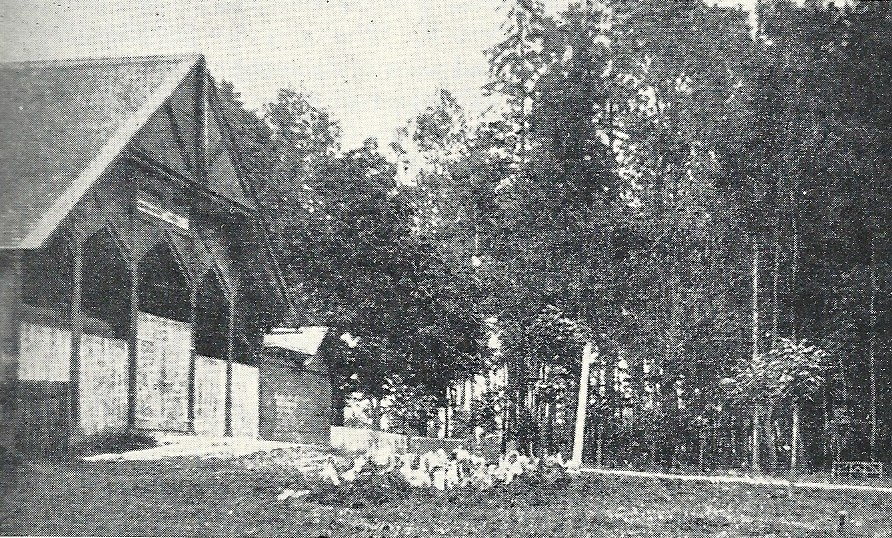 Brilon, so sah die erste Schützenhalle aus